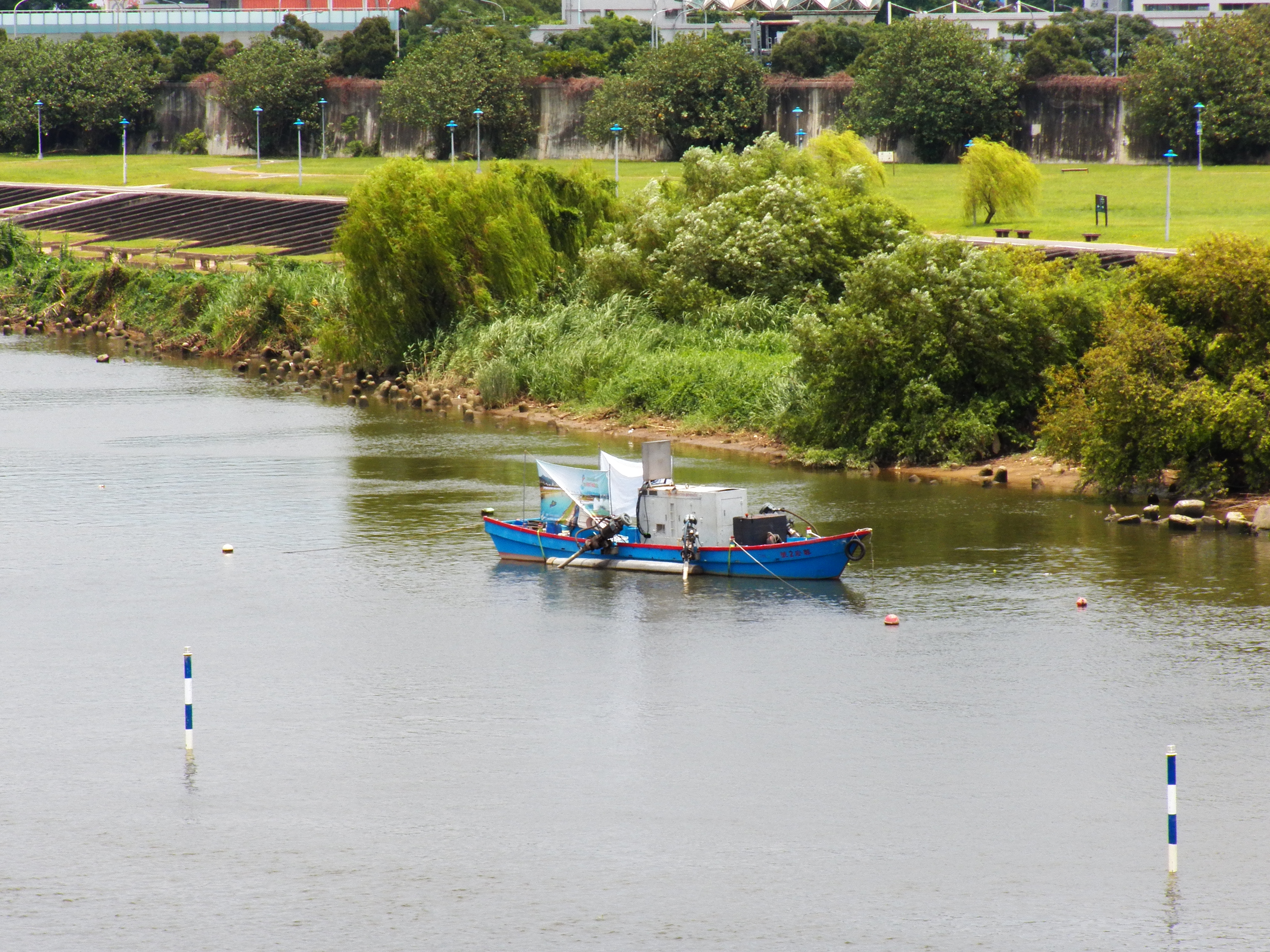 中文（台灣）: 接近基隆河東岸的淨水艇蓉宏2號，攝於民權大橋北面，遠方是內湖美堤河濱公園。